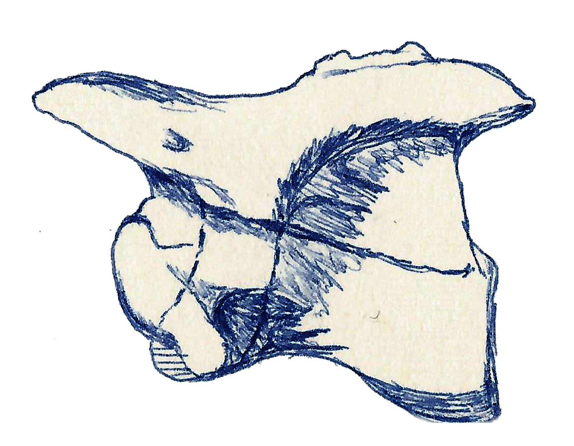 Illustration of a fossil of Arctosaurus